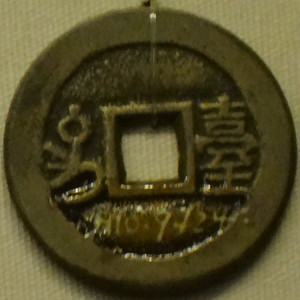 光绪通宝套子钱，背满汉“台”字，拍摄于中国国家博物馆